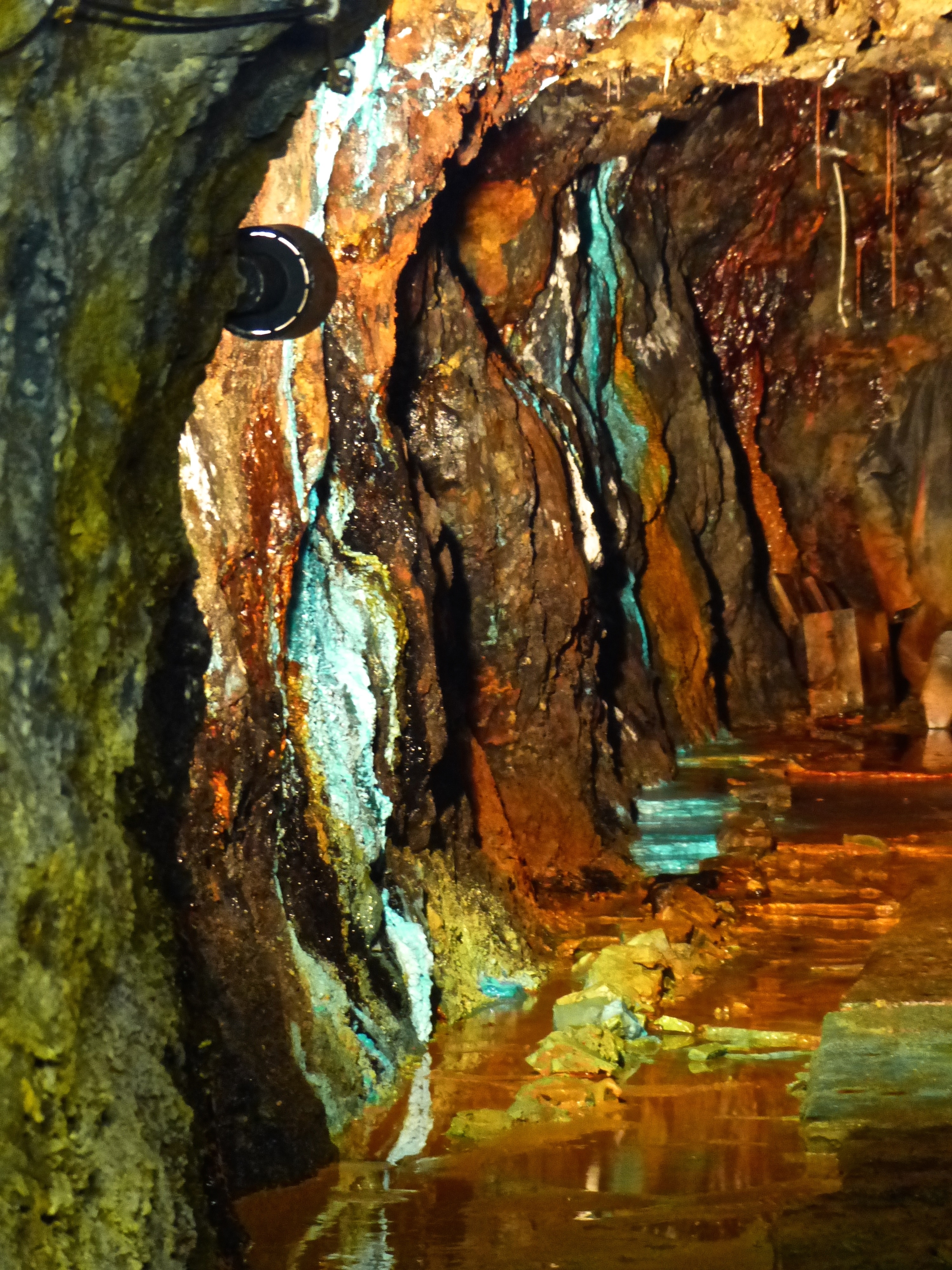 Kilianstollen: Blick in einen Abbau (Eisen- und Kupfermineralisation)